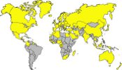 Carte du monde indiquant la présence de la société Sothys à partir des pays indiqués sur son site internet